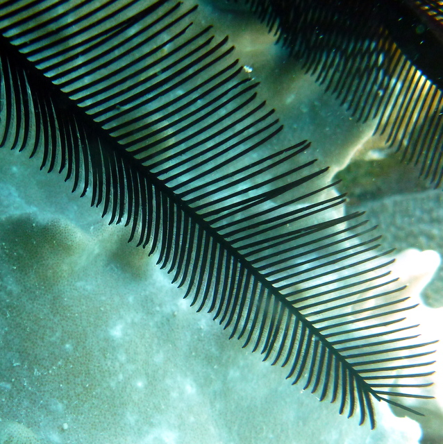 Tropiometra afra, detalle de sus largas pinnulas